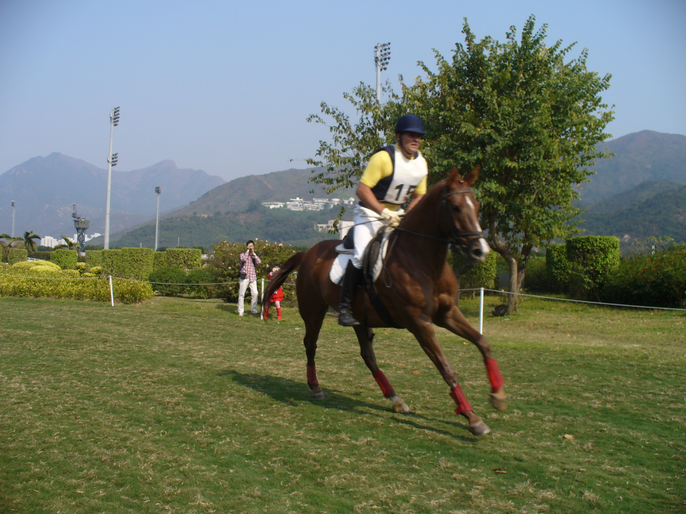 香港馬術展館的馬術示範